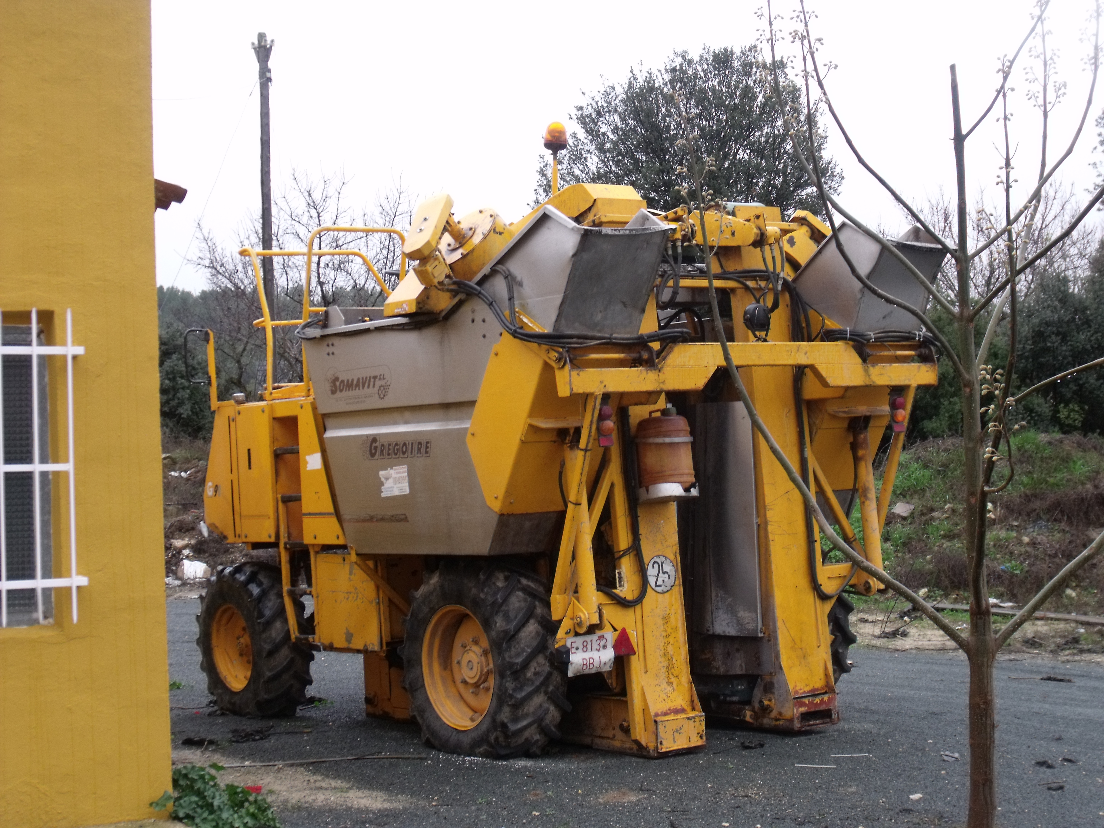 Imágenes de una cosechadora de uva